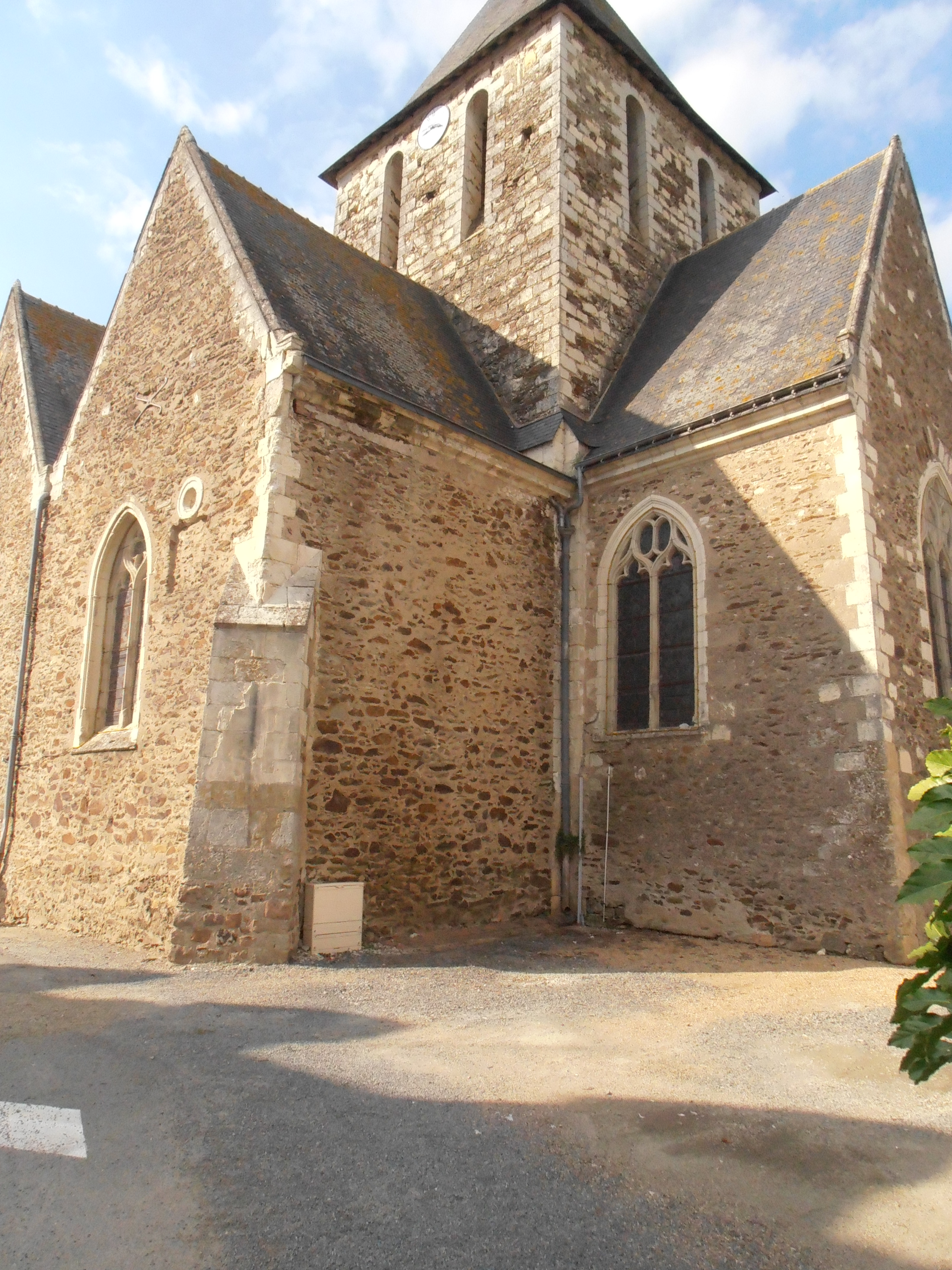 L'église de Miré